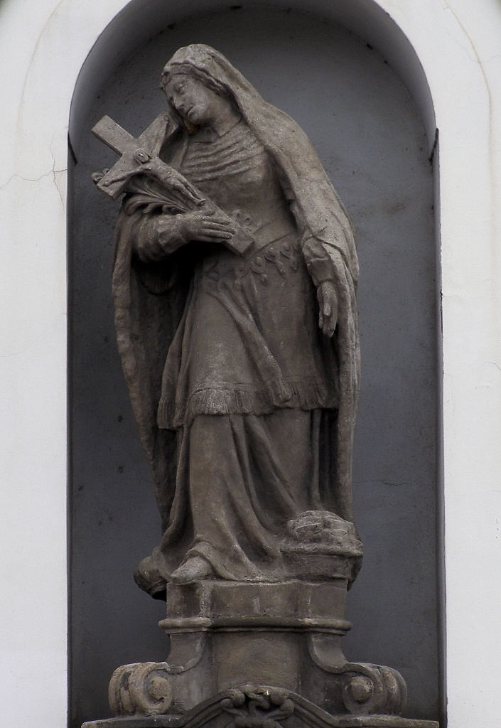 Socha sv. Aji od Františka Ignáce Platzera z let 1770-1771. Socha se nachází v Praze na Smíchově, v Nádražní ulici, v nice u domu č. o. 60.